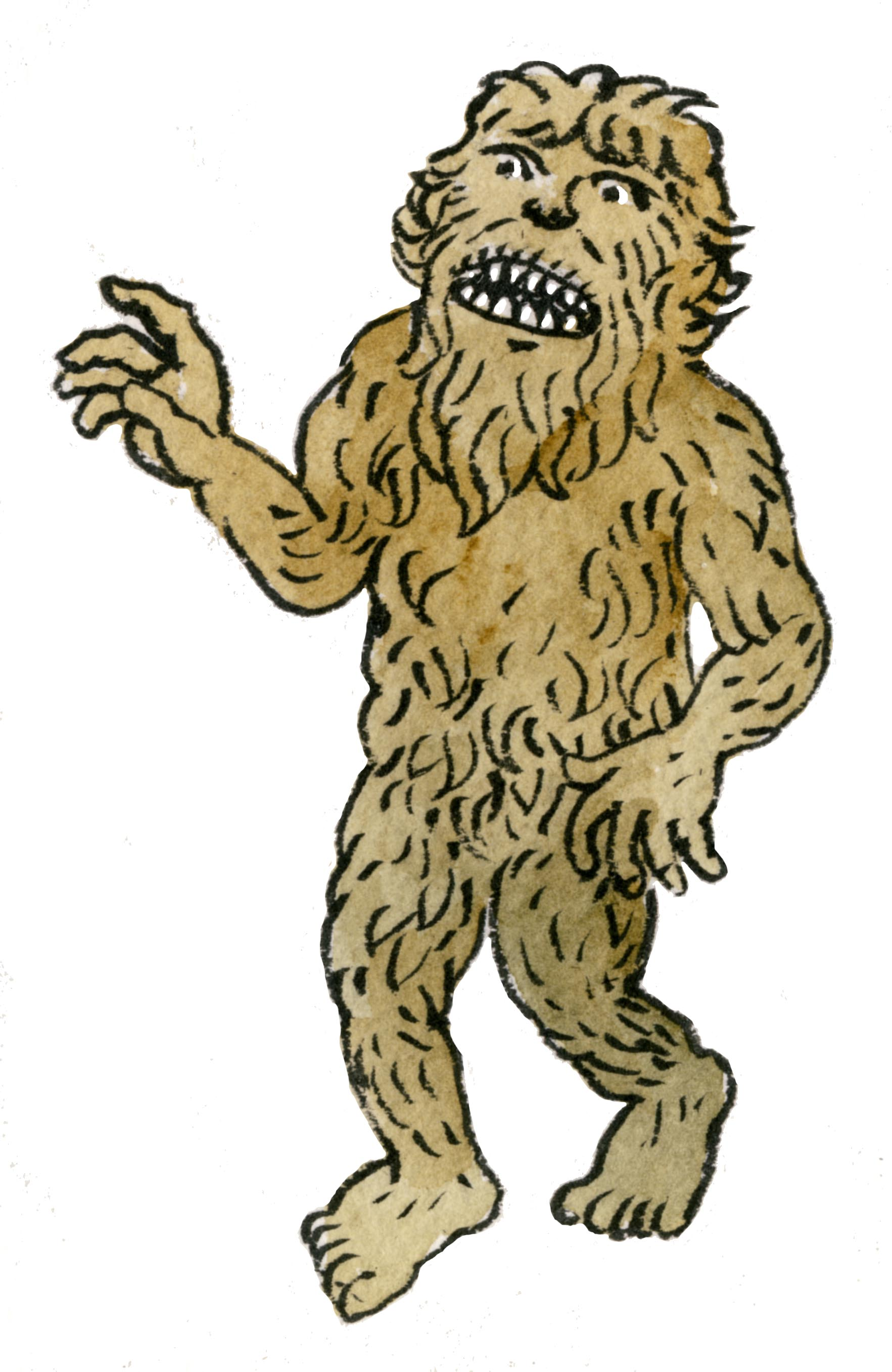 Lamina, créature de la mythologie basque, sous la forme d'un nain velu